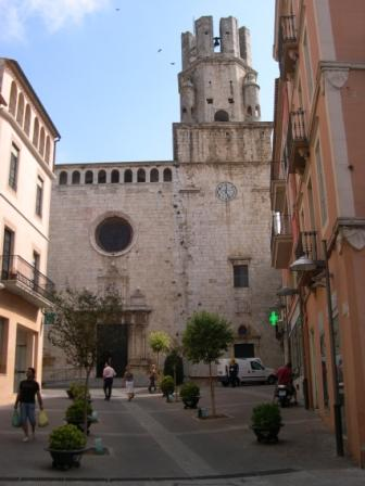 Bisericǎ din Palafrugell.